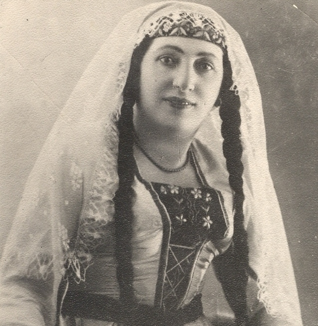 ფოტო საოჯახო არქივიდან, მისი ელექტრონული ვერსია დაცულია ფოლკლორის სახელმწიფო ცენტრის არქივში.